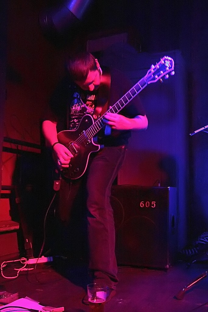 Thesis - Jerzy Rajkow-Krzywicki